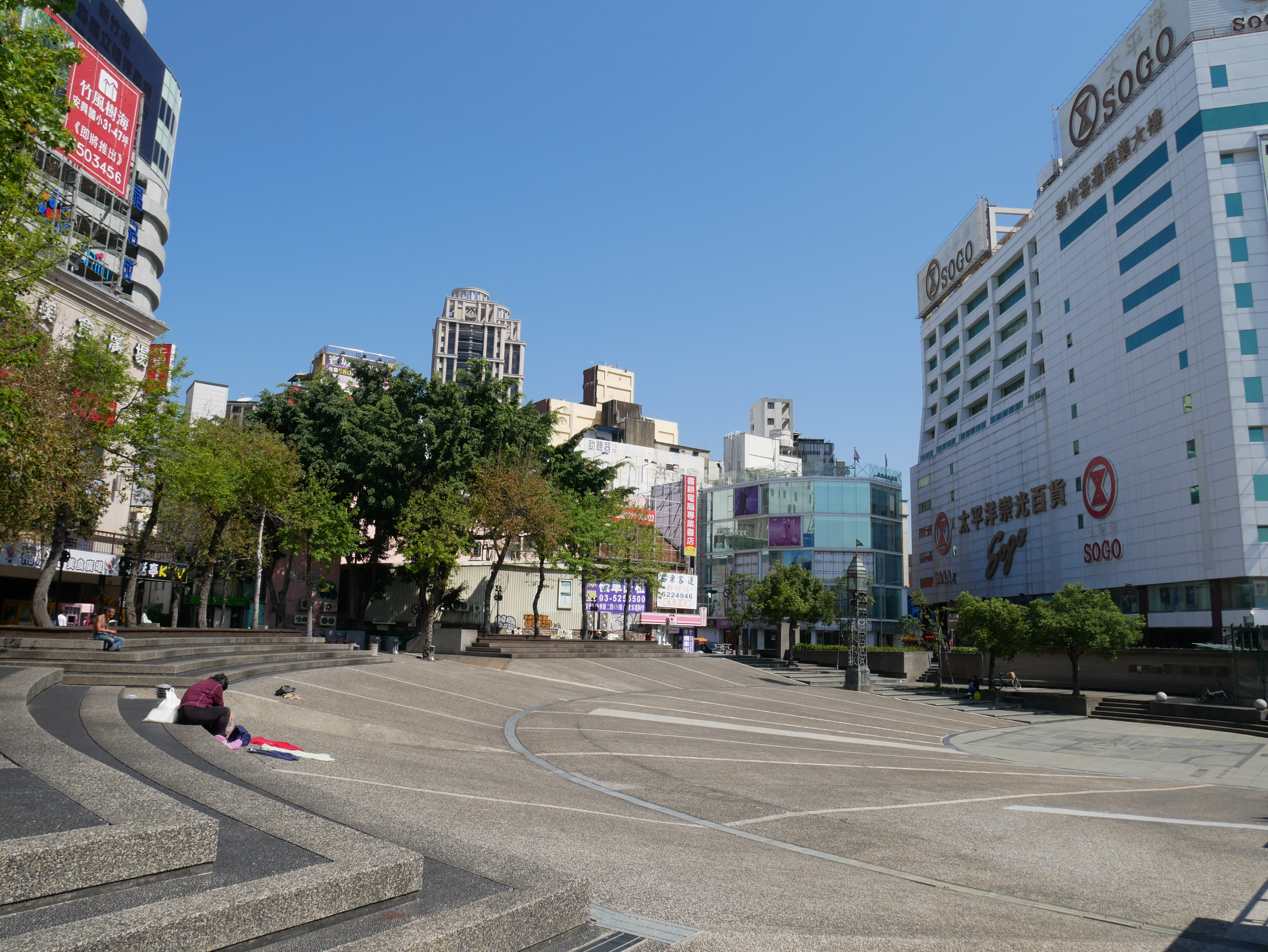 臺鐵新竹車站站前廣場，新竹市東區東門聯里榮光里